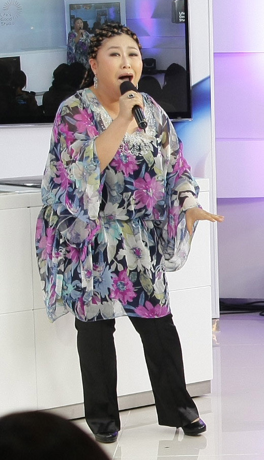 ‘색다른 소통의 시작’ LG전자, 신개념 라이브 방송국 ‘Life’s Good Studio’ 오픈 ■ 가전업계 최초 온라인 방송국 개국 ■ 논현동 ‘디오스 인 갤러리’에 상설 스튜디오 마련 ■ 매주 화/목/토요일 홈페이지를 통해 생방송으로 방영 ■ HA마케팅팀 김정태 팀장, “고객의 직접 참여와 교류를 통해 한층 밀착된 소통의 장을 마련하고 새로운 생활정보 컨텐츠를 제공할 것” LG전자가 가전업계 최초로 온라인 방송국을 개국, 소비자와 색다른 소통을 시작한다. LG전자는 오는 14일 서울 논현동 디오스 인 갤러리(DIOS in Gallery)에 신개념 라이브 방송국 ‘라이프스 굿 스튜디오(Life’s Good Studio)’를 개국한다. ‘라이프스 굿 스튜디오’는 집에서 편안히 즐기는 문화센터의 컨셉으로 매주 화/목/토요일 오후 2시부터 3시까지 요리, 인테리어, 뷰티, 패션, 헬스, 교육 등 다양한 콘텐츠를 홈페이지( 통해 생방송으로 방영한다. 편성 프로그램은 ▲요리 고수들의 비법을 배워볼 수 있는 ‘라이브 맛 쇼(Live 맛 Show)’ ▲건강, 뷰티, 패션 등 실생활에 필요한 다양한 정보를 얻을 수 있는 ‘라이브 이즈 라이프(Live Is Life)’ ▲일반인들의 요리대결 프로그램인 ‘아임 쉐프(I’m Chef)’ 등이다. 각 프로그램은 약 30명의 방청객이 참가하는 공개방송 형태로 운영되며 매회 선착순으로 참가 신청을 받는다. 라이프스 굿 스튜디오는 방송이 없을 때는 소규모 모임을 위한 장소로 사용할 수 있도록 무료로 일반 고객들에게 대관해 준다. LG전자 HA마케팅팀 김정태 팀장은 “고객의 직접 참여와 교류를 통해 한층 밀착된 소통의 장을 마련하고 새로운 생활정보 컨텐츠를 제공할 것”이라고 말했다. ■ 참고: 프로그램 상세정보 ● 화요일 ‘Live 맛 Show’ –요리와 공연의 맛있는 어우러짐 Live 맛 show는 요리연구가 ‘푸드킹콩’ 최승원과 윤서희 리포터가 진행한다. ‘Let’s cook & play’를 주제로 요리와 공연이 어우러진 한편의 쇼를 추구한다. 국내외 유명 쉐프 못지 않은 실력을 지닌 국내 요리 파워블로거나 혹은 자신만의 비법 레시피가 있는 일반인을 초대해 진행한다. 요리가 진행되는 동안 동호회의 수준 높은 특별공연도 볼 수 있어 요리와 공연문화를 동시에 즐길 수 있는 프로그램이다. ● 목요일 ‘Live is Life’-살아있는 정보로 생활을 디자인하라 Live is Life는 개그맨 정태호와 윤서희 리포터가 진행한다. 평소 관심은 있지만 쉽게 배울 수 없었던 실생활에 필요한 폭넓은 분야와 정보를 다루는 것이 특징이다. 예를 들어 패션 프로그램의 경우, 단순한 패션 코디법이 아닌, ‘남편 기 살리는 파워 수트 코디법’, ‘연말 부부모임 스타일 짱 노하우’등 세분화 되고 타깃의 실생활과 밀접한 정보를 다룰 예정이다. ● 토요일 ‘I’m Chef’-숨은 요리 고수들의 1:1 요리대결 I’m Chef는 토요일에 방송되는 생방송 요리대결 프로그램이다. 요리연구가 구본길, 이혜정이 심사위원으로 생활 속 무림의 요리 고수들의 1:1 요리대결을 통해 맛과 멋, 감동과 재미를 동시에 전달한다. 인터넷을 통한 참가신청 후 출연자를 선별한다. 참가자는 대결 전 주, 방송을 통해 공개된 재료를 활용해 30분내로 요리를 완성해야 한다. 우승자 선정은 구본길, 이혜정 요리연구가로 구성된 전문심사위원단 의견 50%, 방청객 심사단의 현장투표 점수 30%, 인터넷 투표 점수 20%를 취합해 선정한다. 우승자는 다음 승부에 도전할 것인지를 결정하고 최고 4승까지 도전할 수 있다. 최종 우승자에게는 미국에서 개최되는 2011년 LG전자 글로벌 요리대회 ‘LTGC’에 한국 국가대표로 참가할 수 있는 자격이 주어진다.